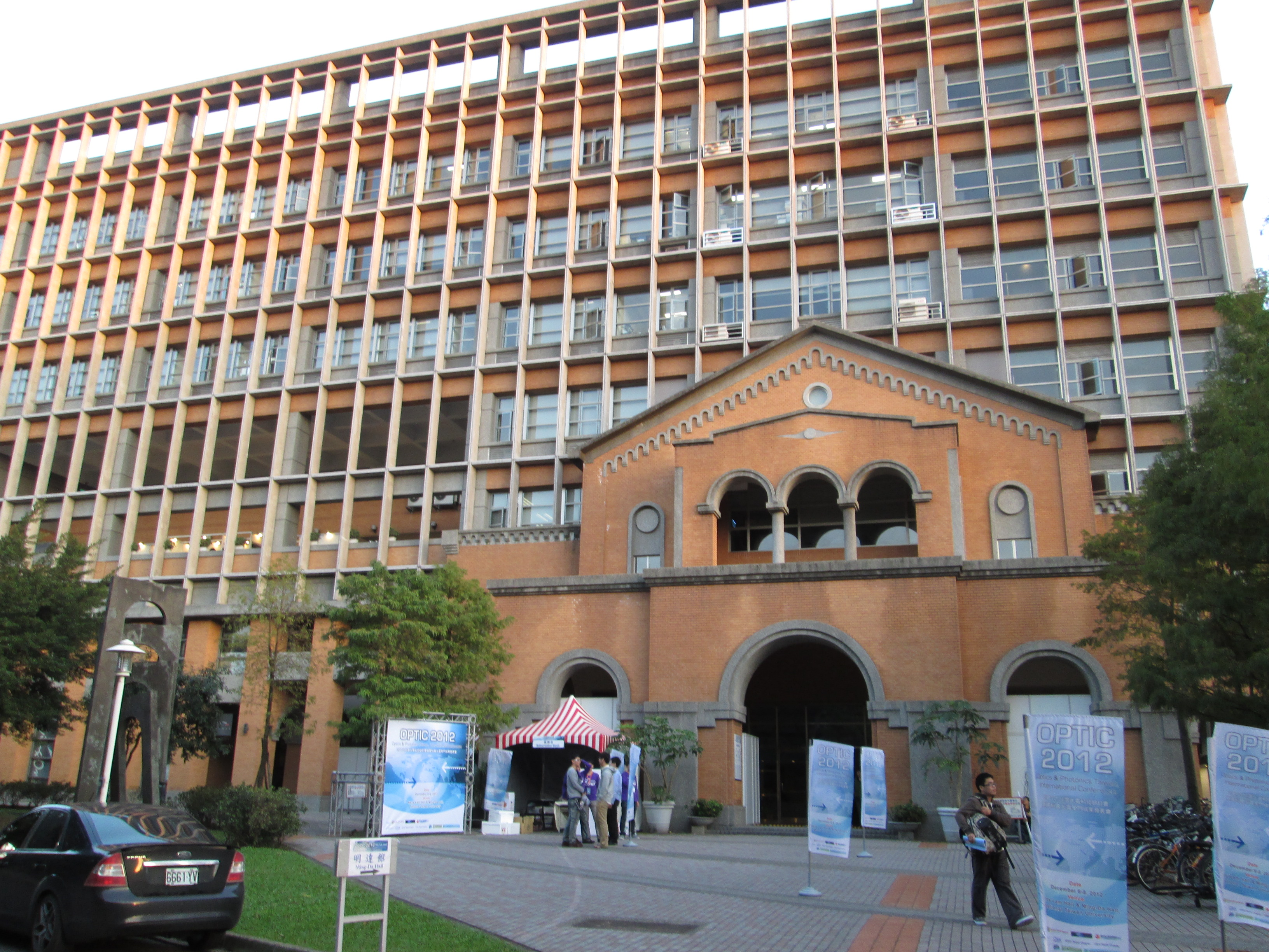 中文（台灣）: 明達館正門。